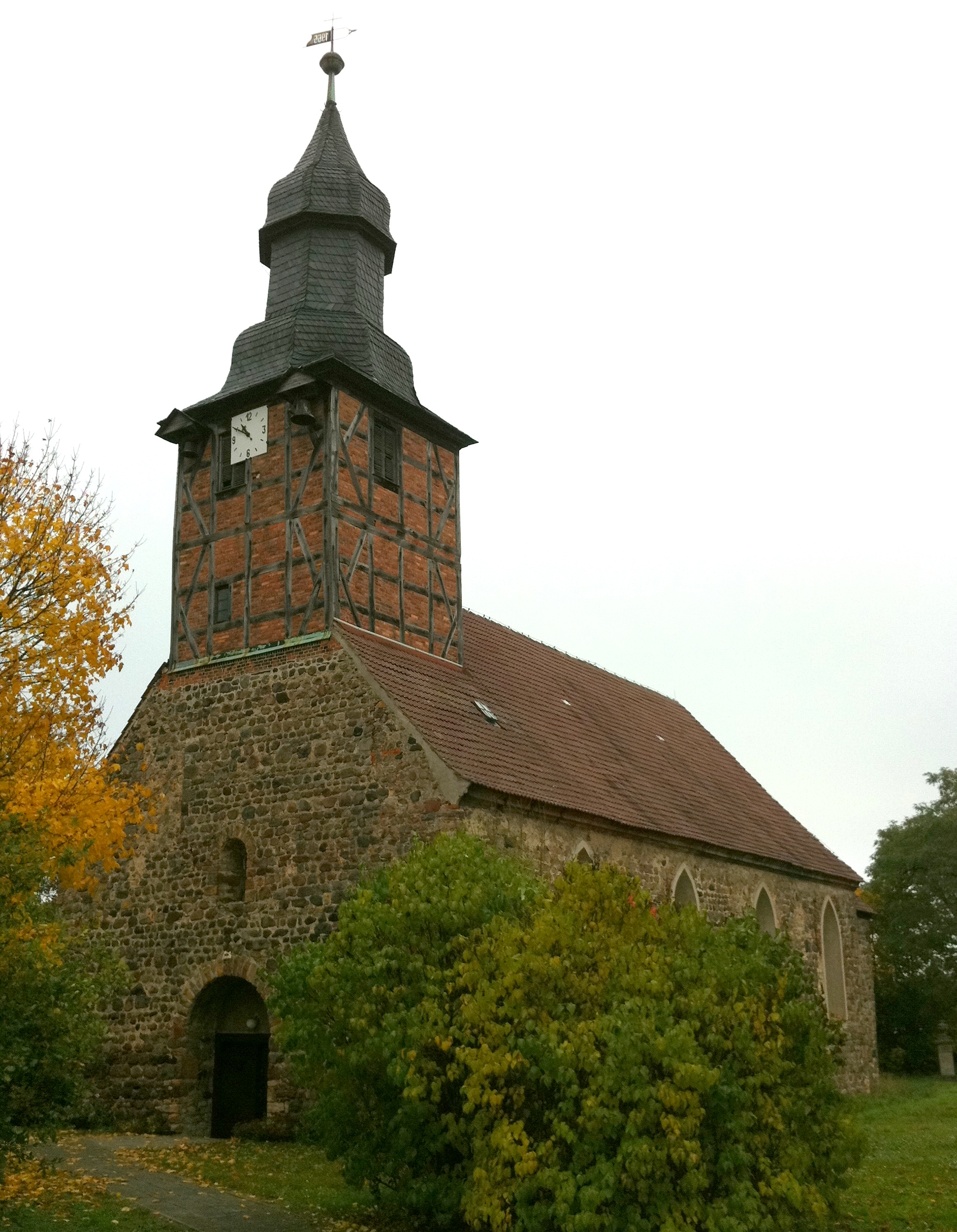 Sankt-Petri-Kirche Stegelitz